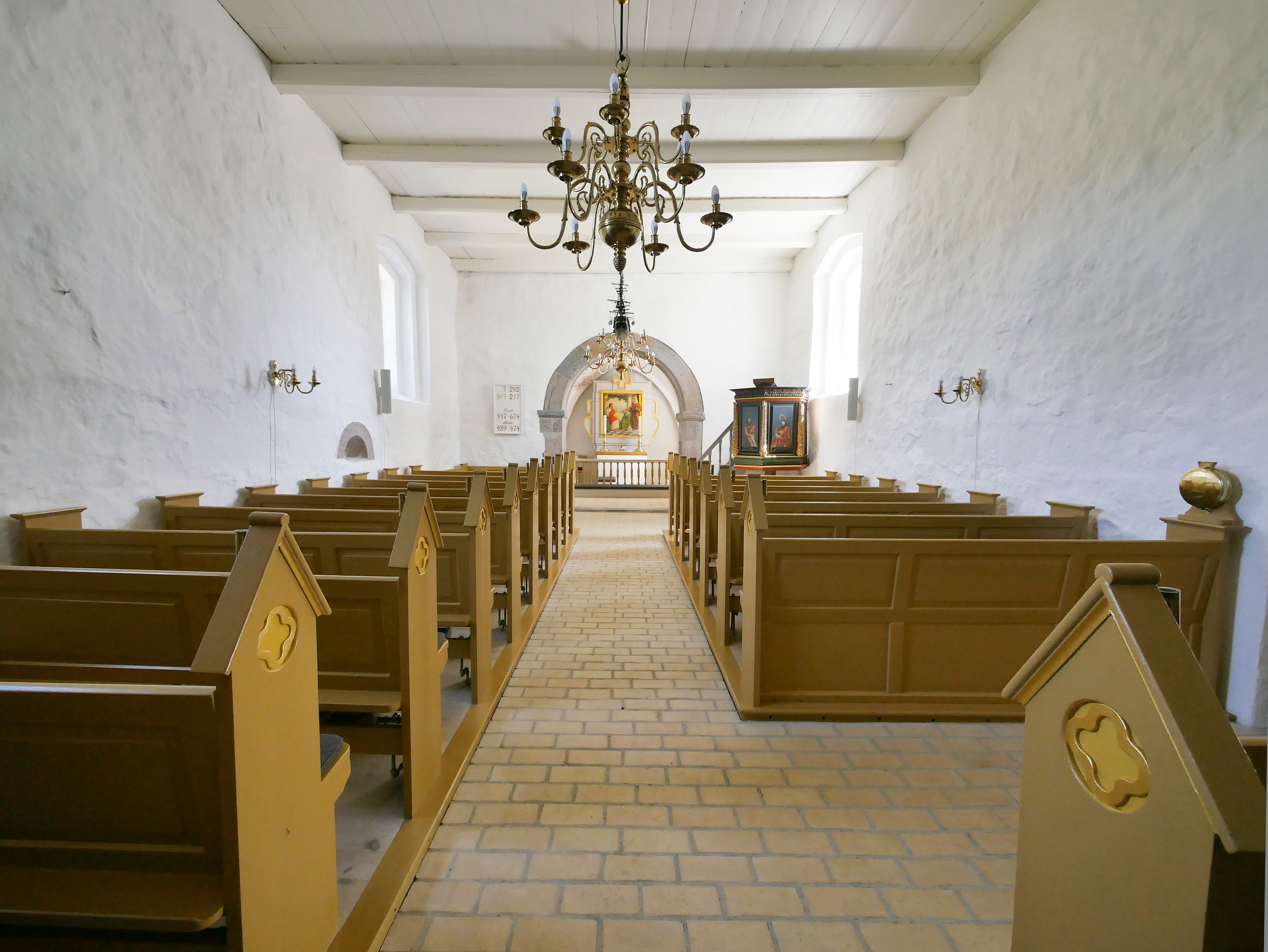 Oue Kirke - Kirchenschiff von der Orgel aus gesehen